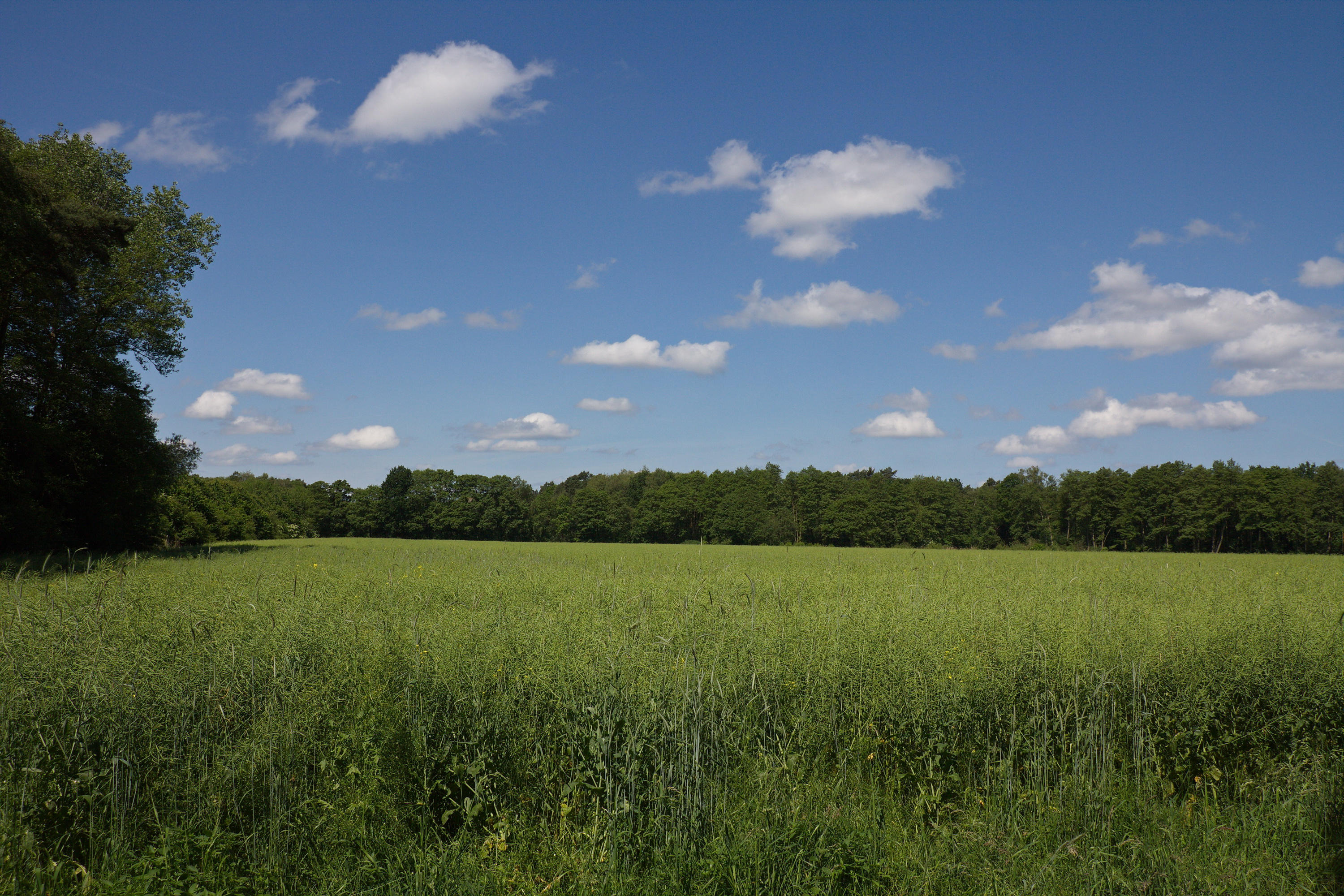 Naturschutzgebiet Trunnenmoor, Niedersachsen, Deutschland